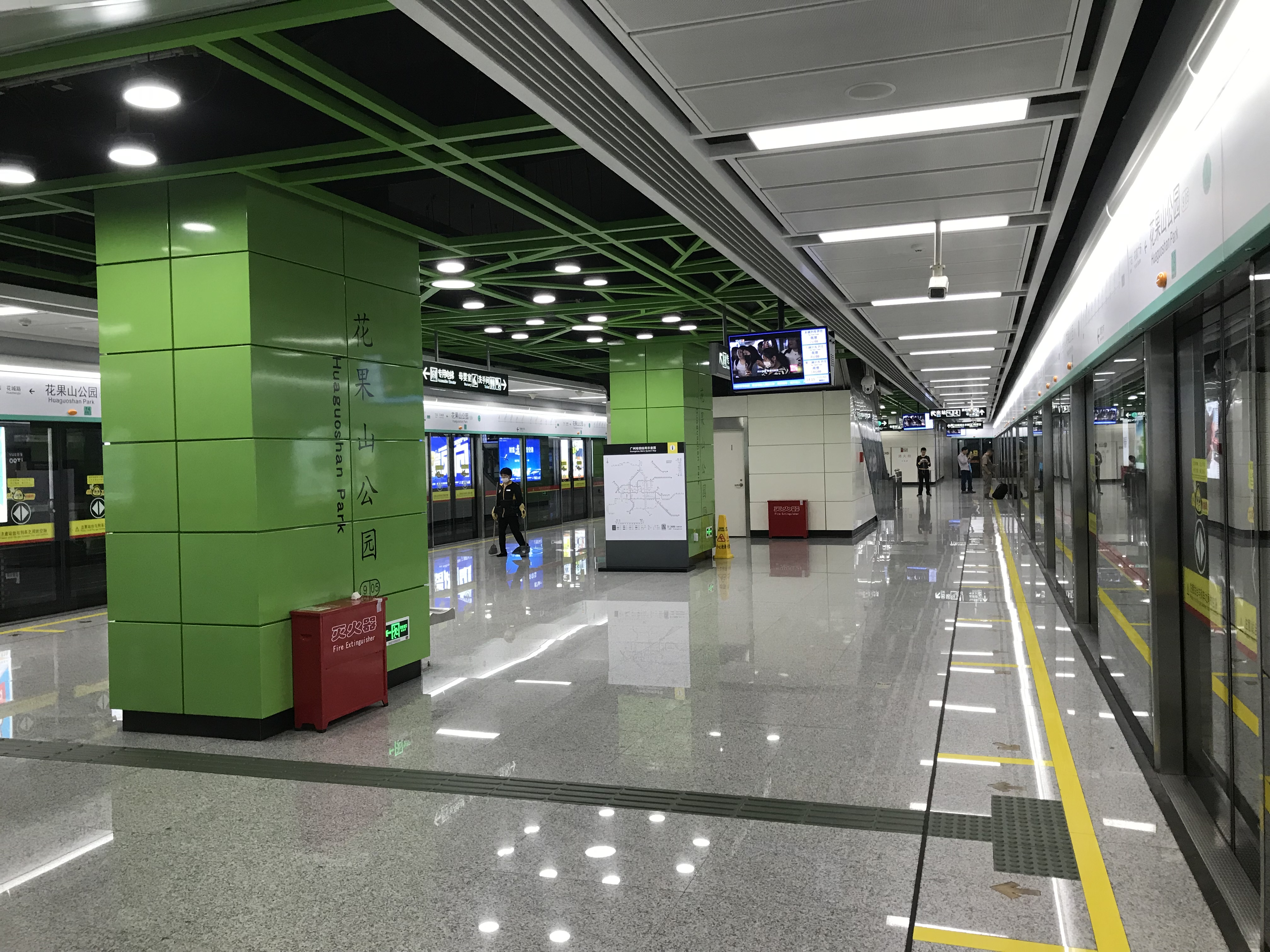 广州地铁花果山公园站